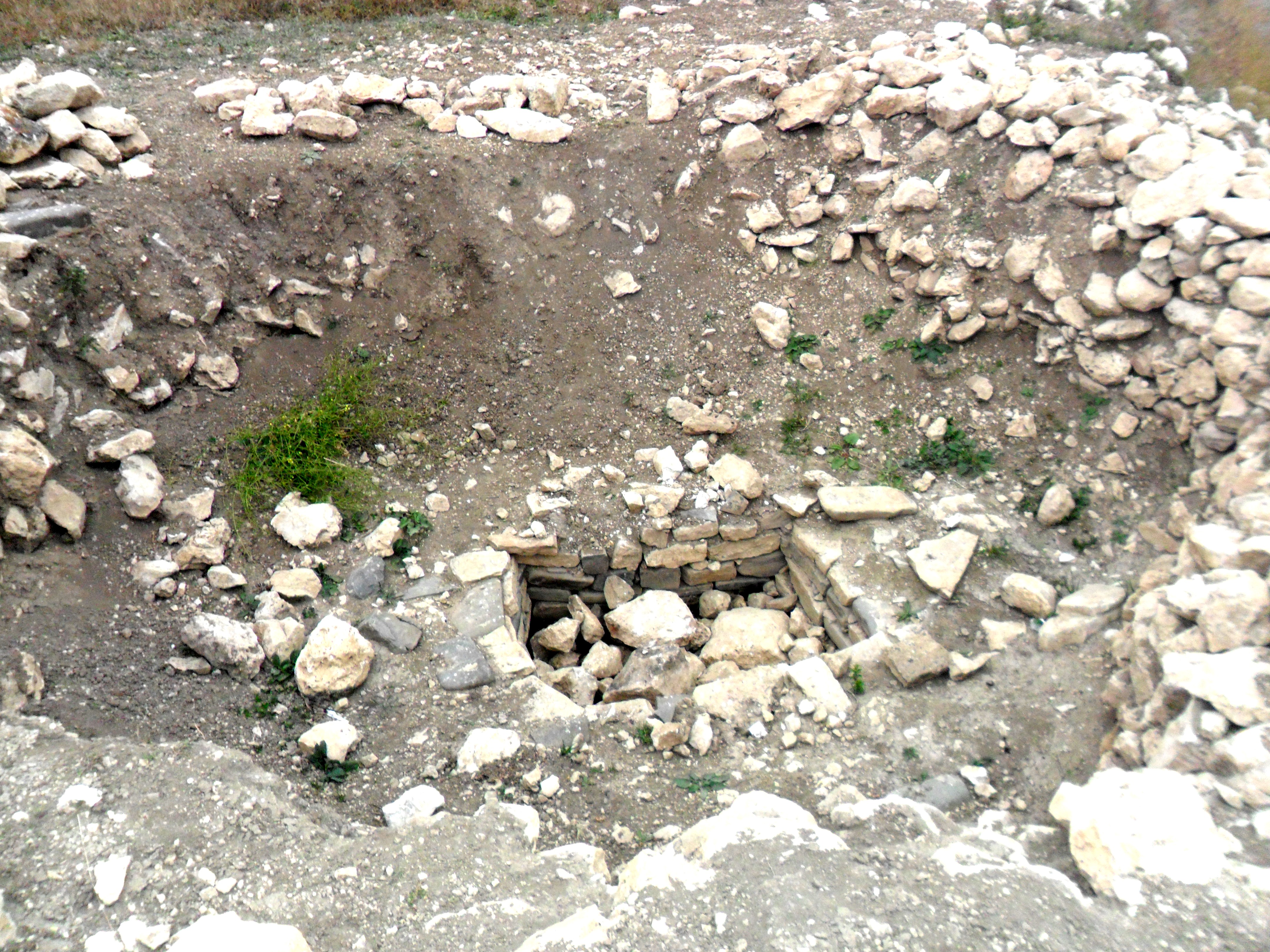 Cek kəndində Kukaş kurqanı